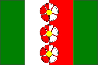 Horní Podluží vlajka